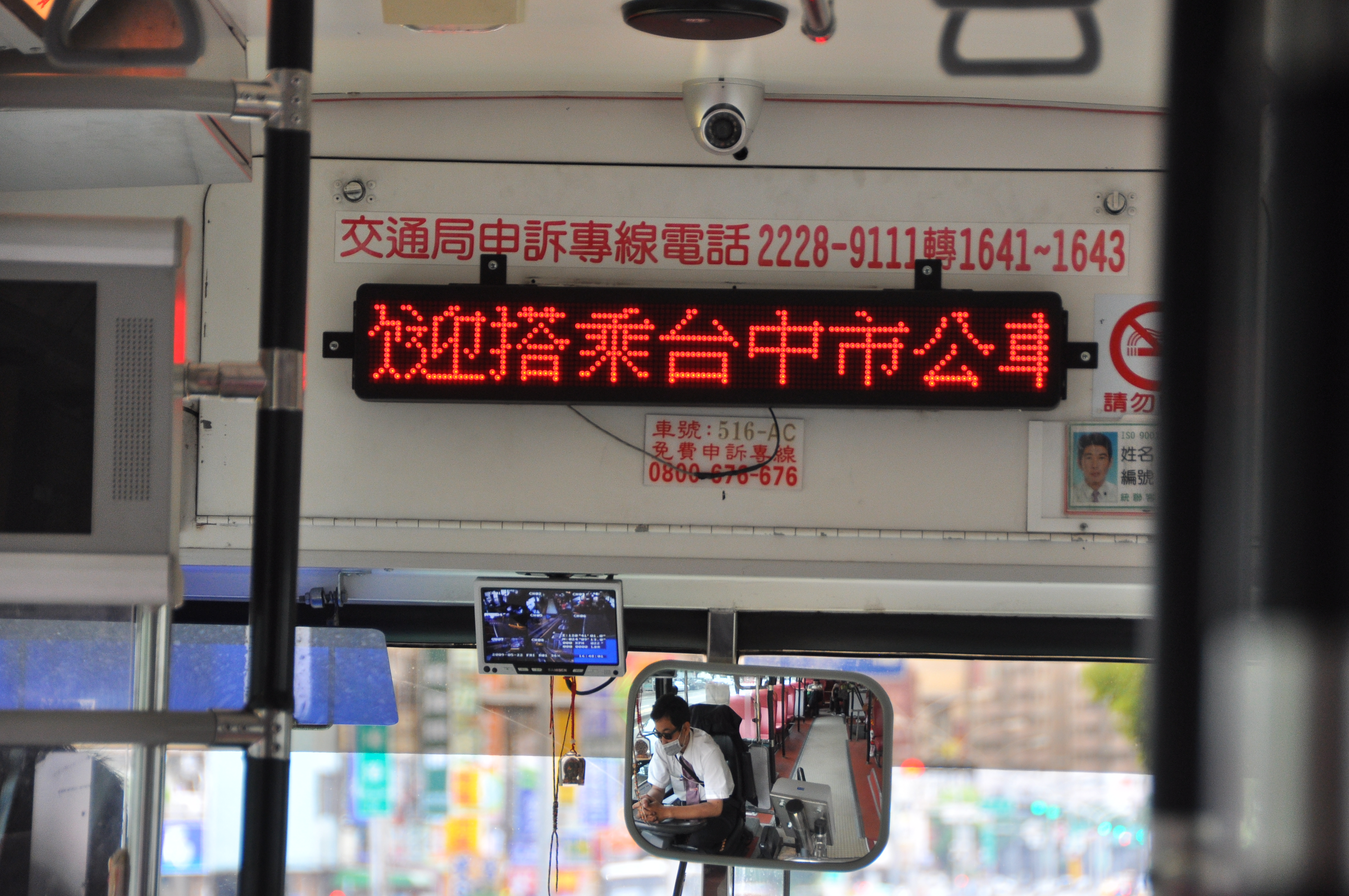 統聯客運TTJ捷運公車516-AC內側的LED到站資訊顯示屏。